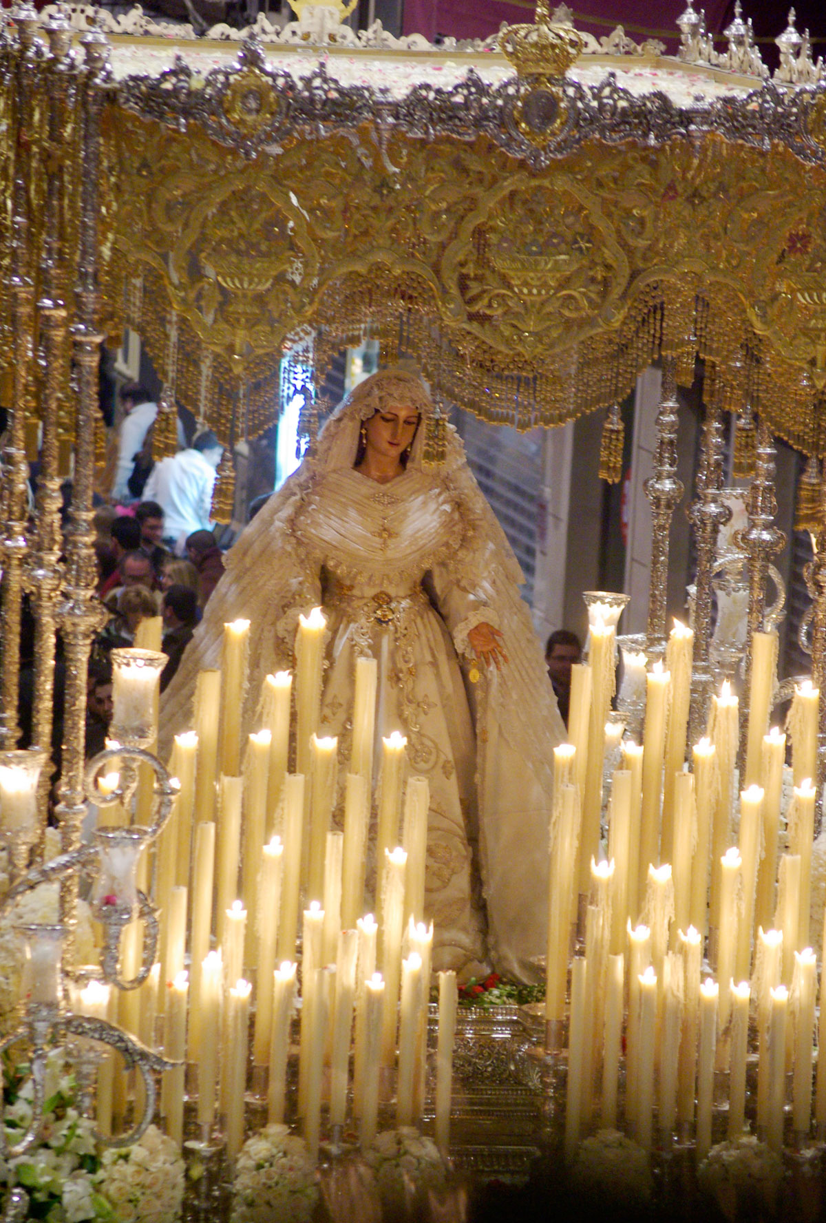 María Santísima del Rocío en su trono procesional. Runa Simi: Rocio Pallan.